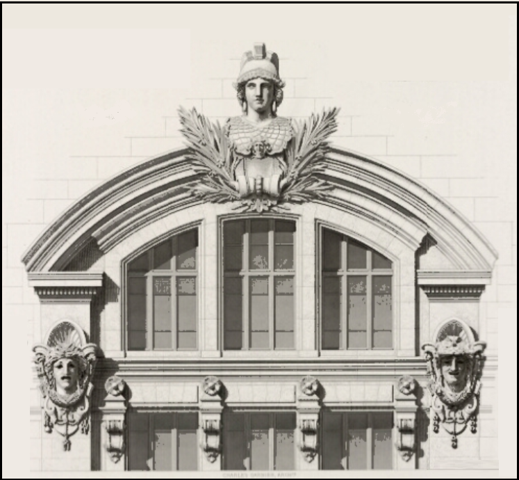 Façade postérieure Minerve